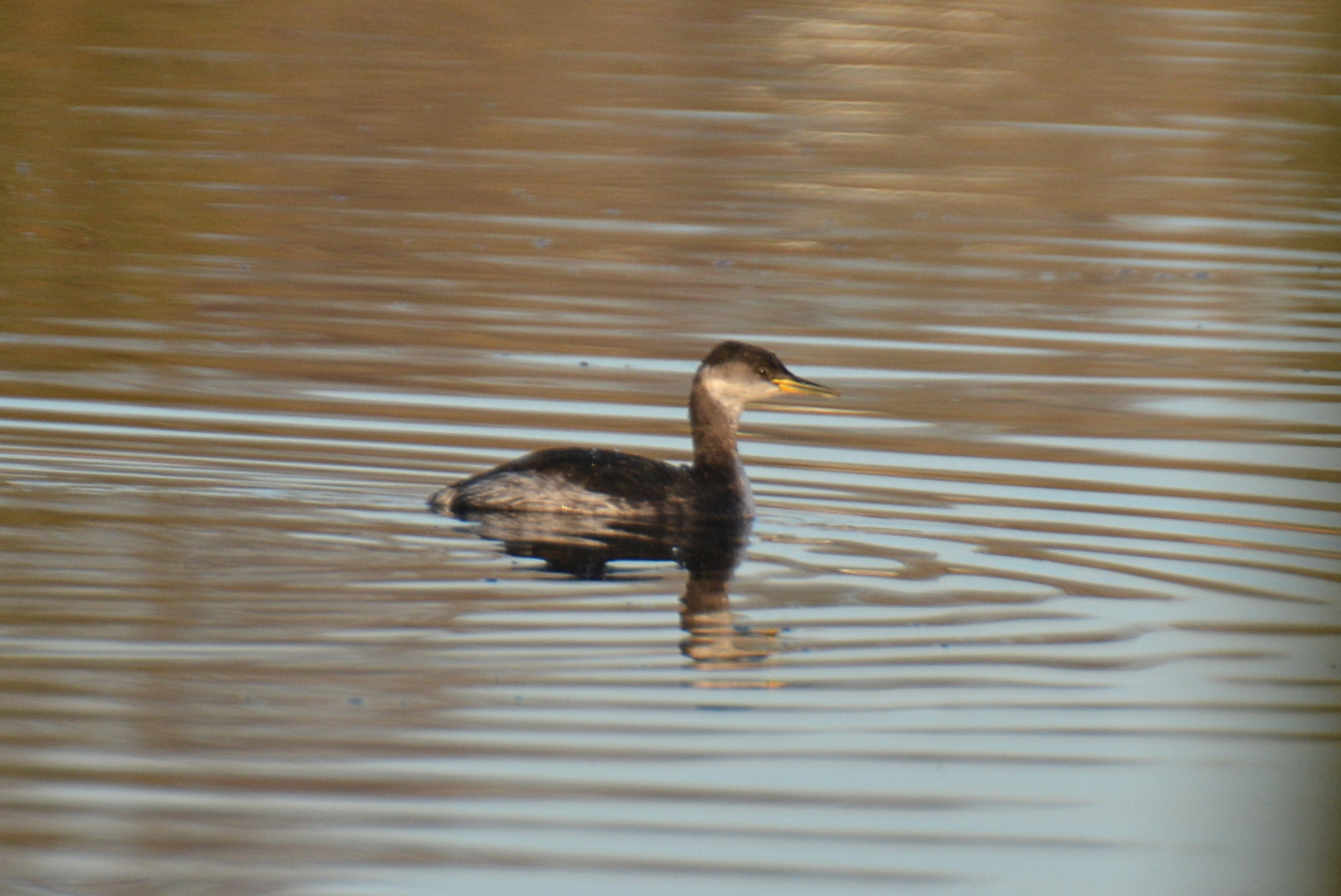 Der Rothalstaucher im Schlichtkleid am Chiemsee (Bayern)